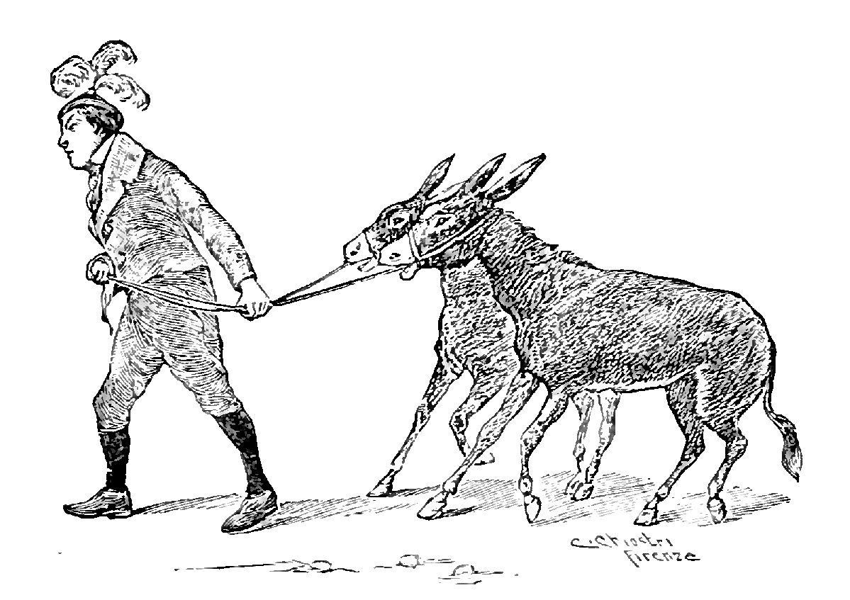 Illustrations from "Le avventure di Pinocchio, storia di un burattino", Carlo Collodi, Bemporad & figlio, Firenze 1902 (Drawings and engravings by Carlo Chiostri, and A. Bongini)